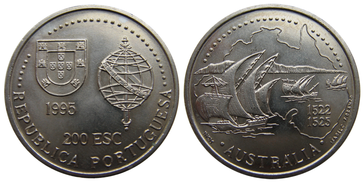 200 escudos 1522-1525 1995 Australia